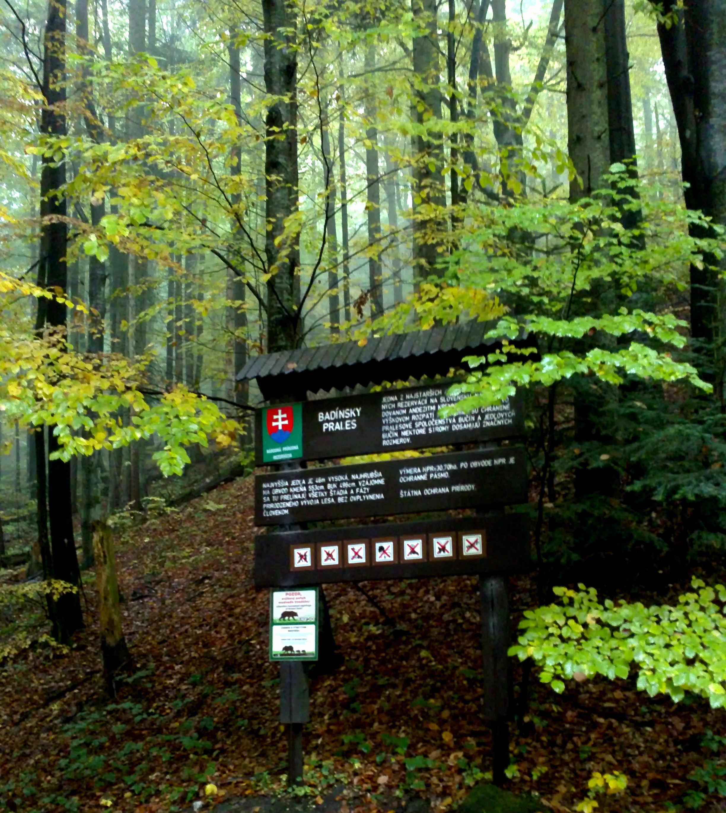 Informačná tabuľa v Badínskom pralese.